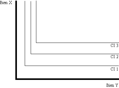 courbes d'indifférences à complémentarité parfaite Graphique réalisé sous xfig Sous GFDL Utilisateur:~Pyb septembre 2004